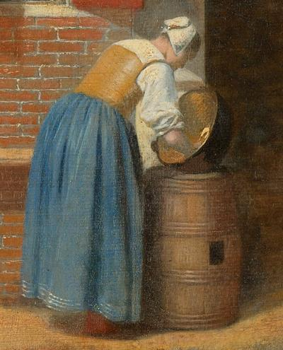 Detail Pieter de Hooch A Company in the Courtyard behind a House